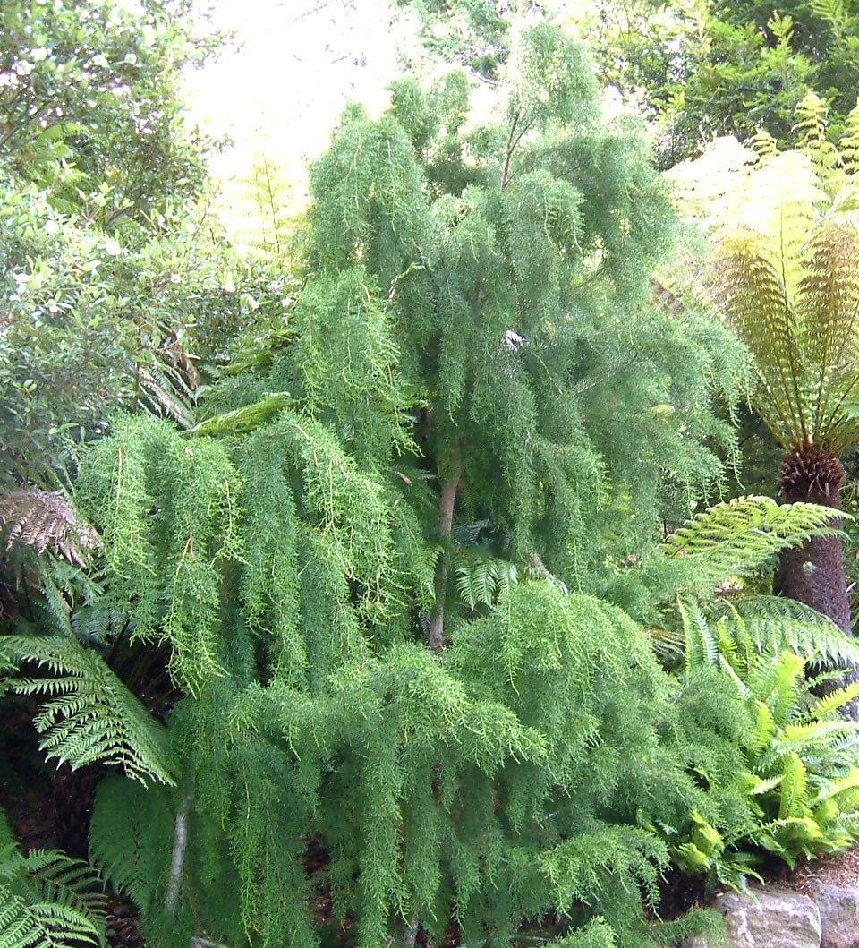 Pin Huon Lagarostrobos franklinii